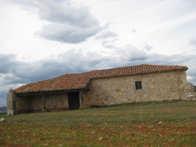 Vista de la ermita de Santa María, en la localidad española de Quintanarraya (Burgos).